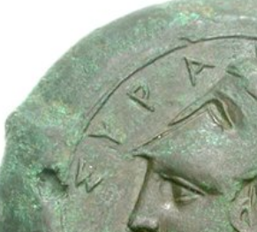 Particolare di moneta siracusana con scritta ΣΥΡΑ. Coniata circa nel 380 a.C. Immagine derivata da